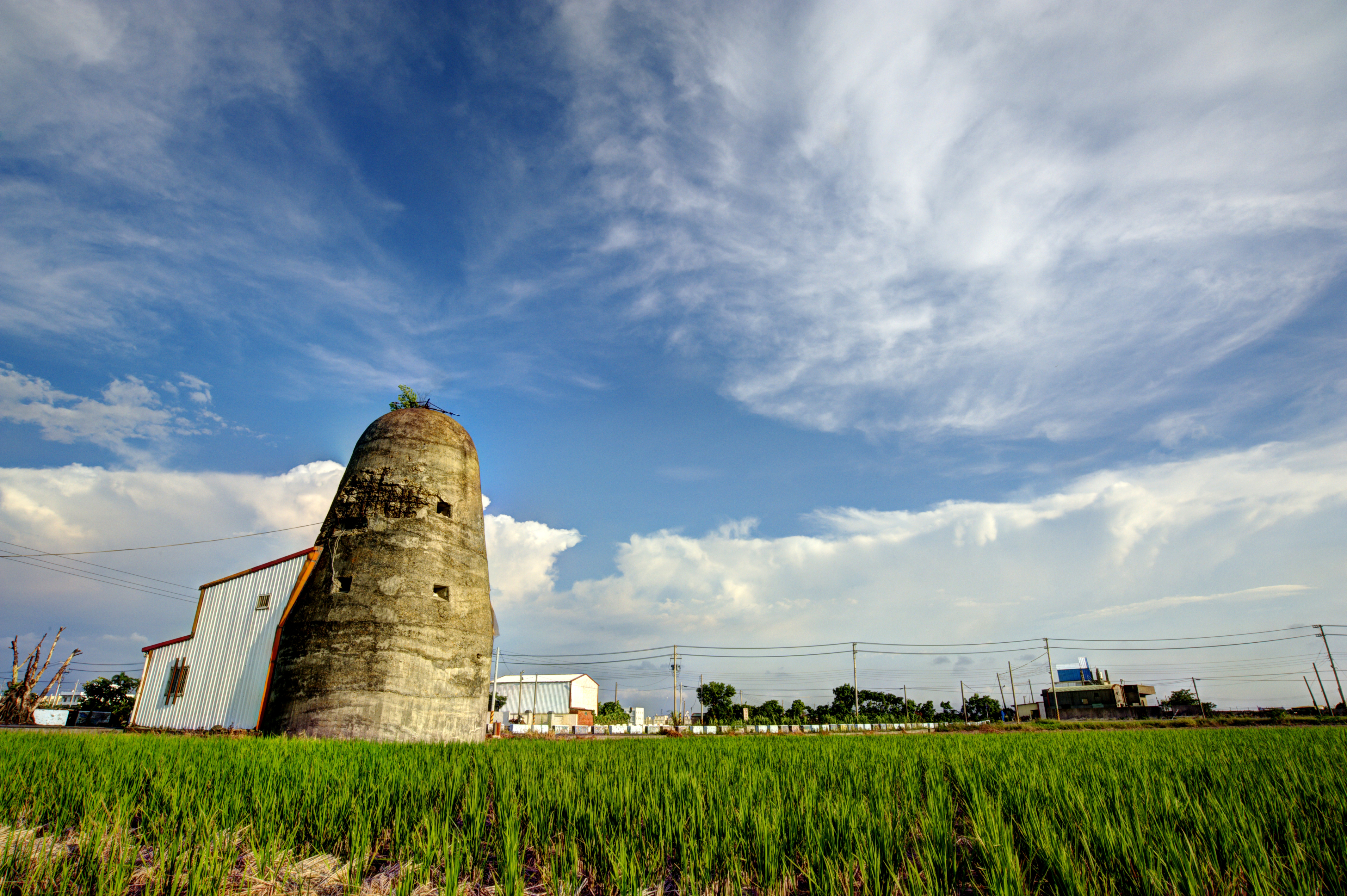 彈孔擊落的斑斕見證日據時代的戰爭